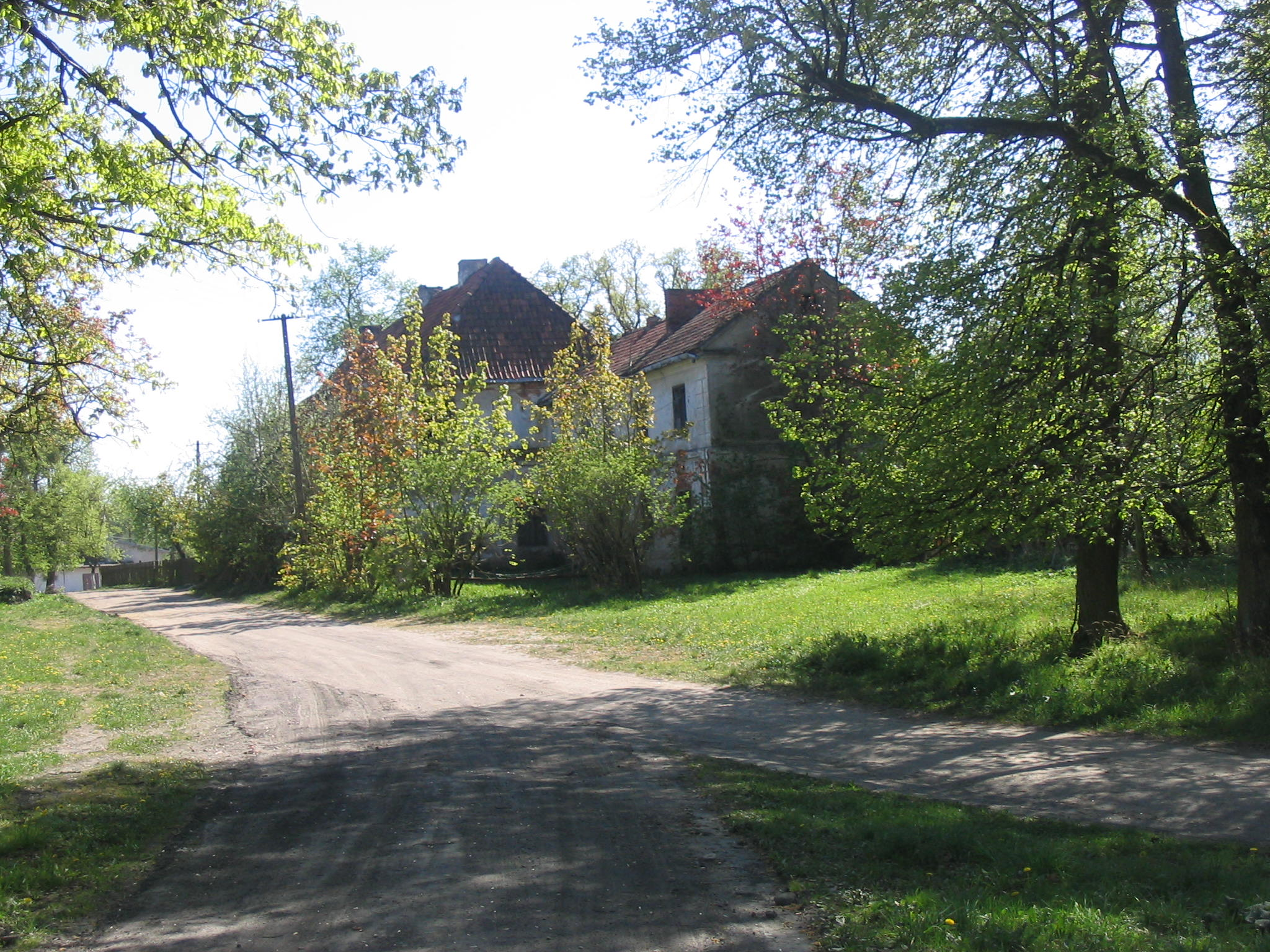 Widok na pałac w Garbnie, gmina Barciany